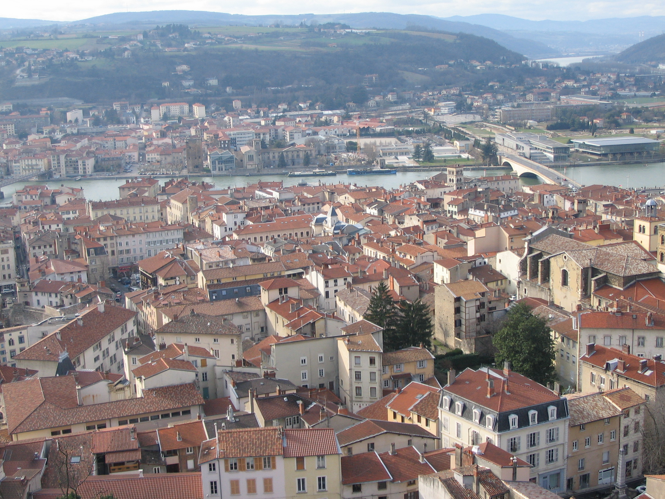 Vienne, l'Isère et le pont de Lattre de Tassigny, St-Romain en Gal, Ste-Colombe tout à gauche (Rhône).